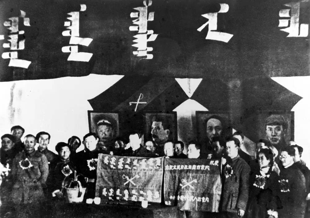 原图注：1947年5月1日，当选的内蒙古自治政府主席、副主席、委员在大会上宣誓就职 新华社发